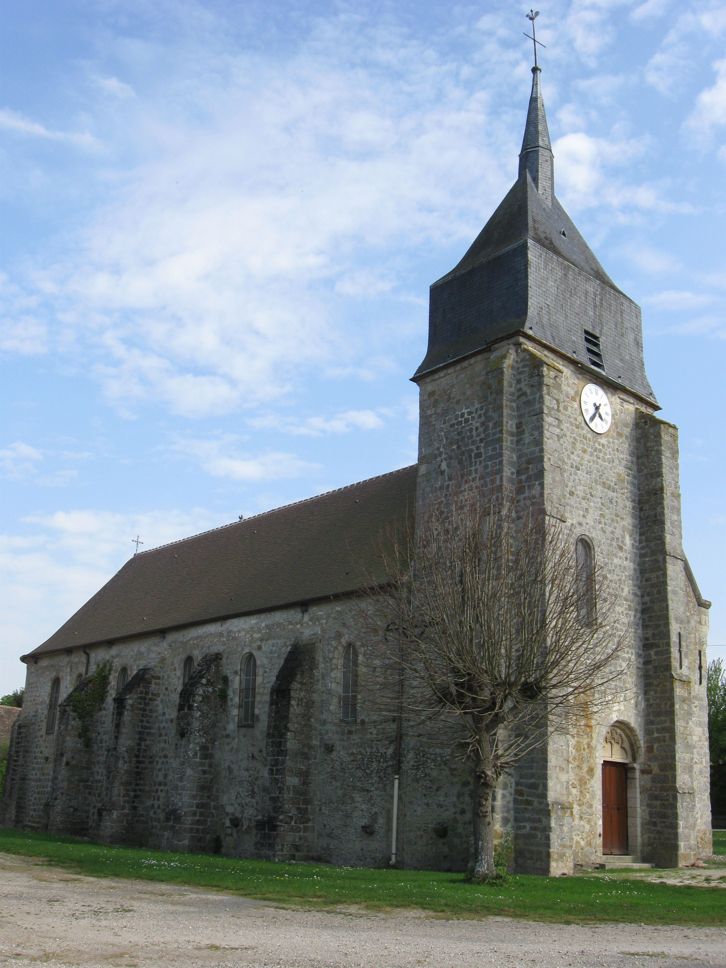 Église Saint-Laurent de La Tombe. (Seine-et-Marne, région Île-de-France).